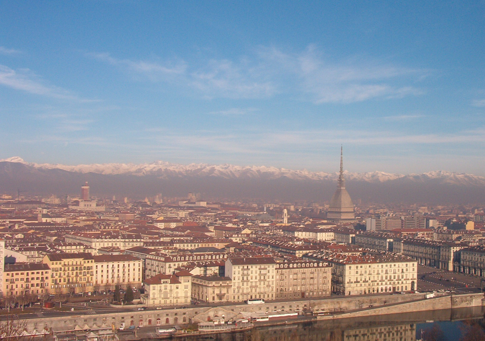 Panorama di Torino dal Monte dei Cappuccini - Italy